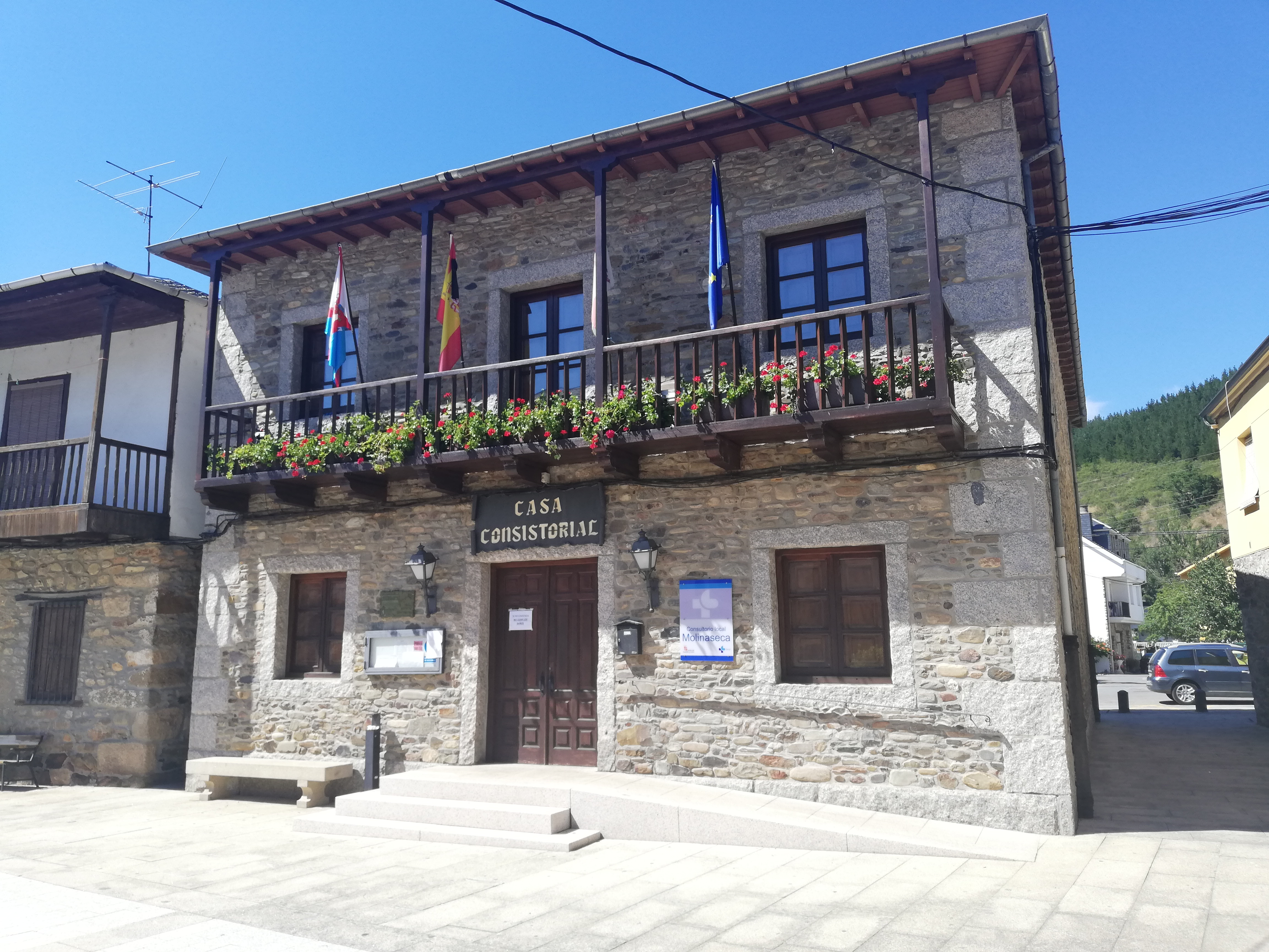 Casa consistorial de Molinaseca, O Bierzo.